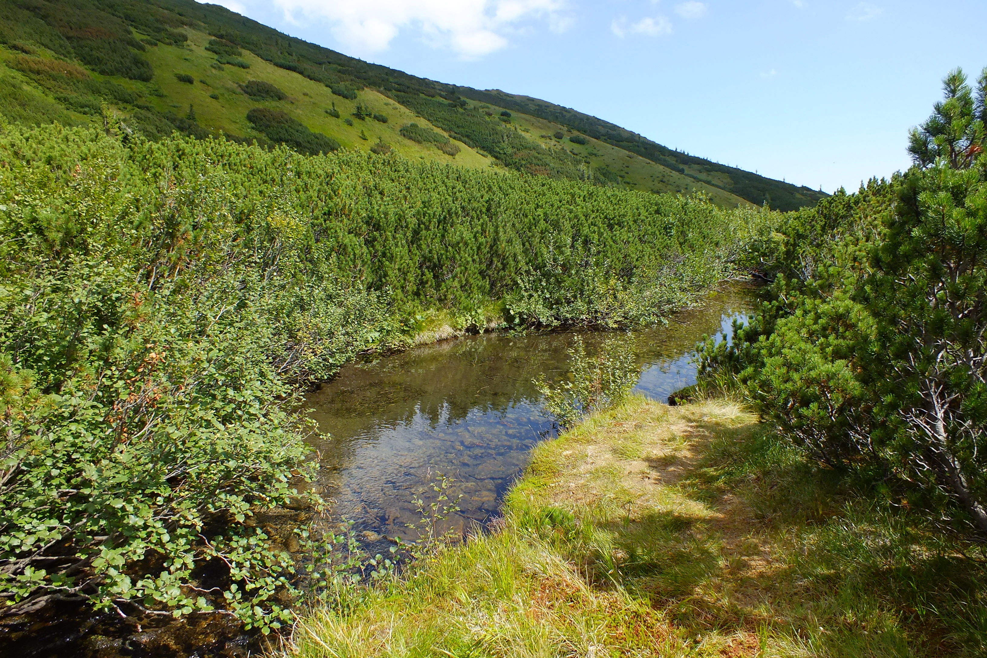 Веснянки - протічне озерце витягнуте вздовж струмка.